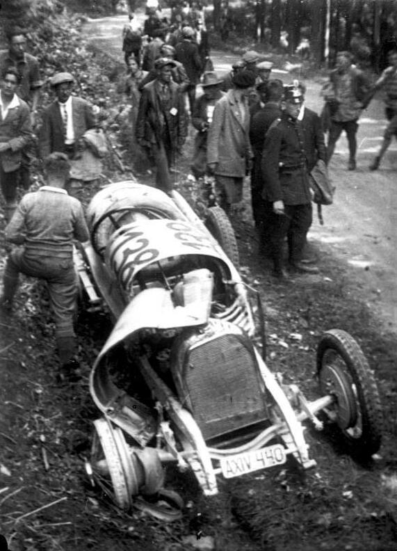 Das schwere Auto-Rennunglück beim Bergrennen des A.D.A.C. in Freiburg i/Br. bei welchem Deutschlands bester Bergfahrer Baron von Stuck schwer verunglückte. Der zertrümmerte Rennwagen des Baron von Stuck auf der Rennstrecke.